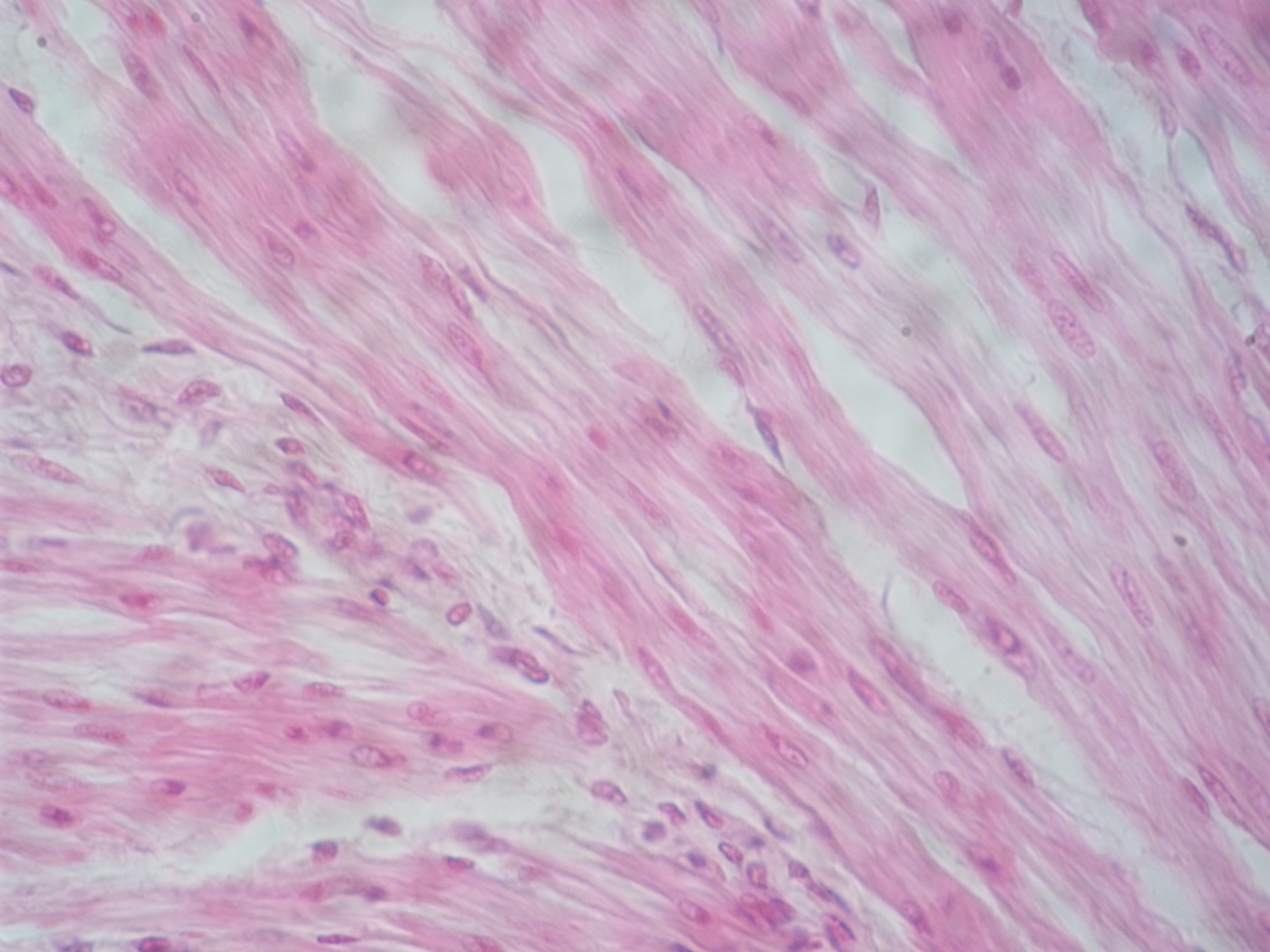 Músculo liso de la vejiga urinaria, teñido con hematoxilina eosina, 400X.